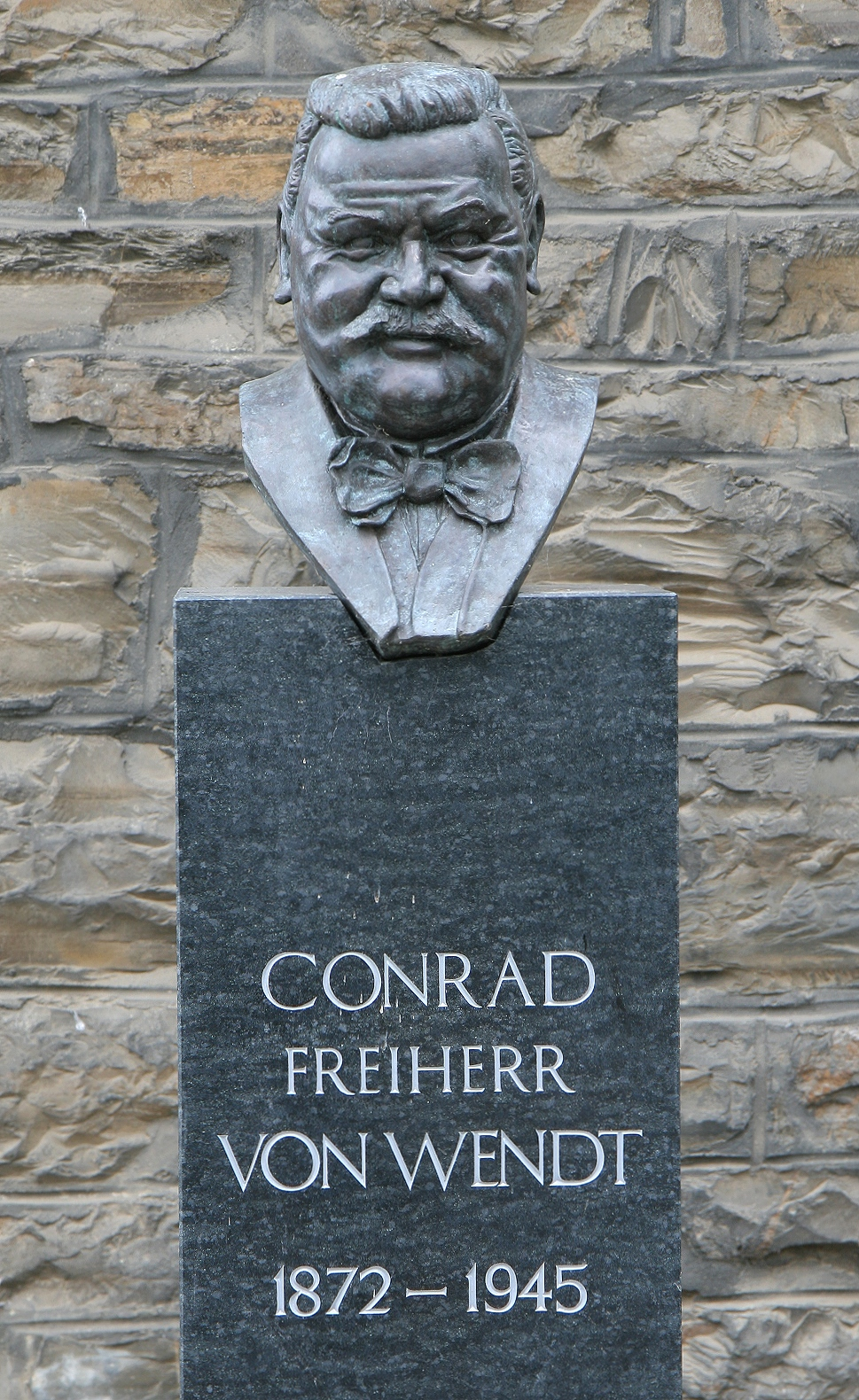 Denkmal für Conrad Freiherr von Wendt vor Schloss Gevelinghausen in Olsberg-Gevelinghausen. Skulptur von Boris Sprenger aus Madfeld.